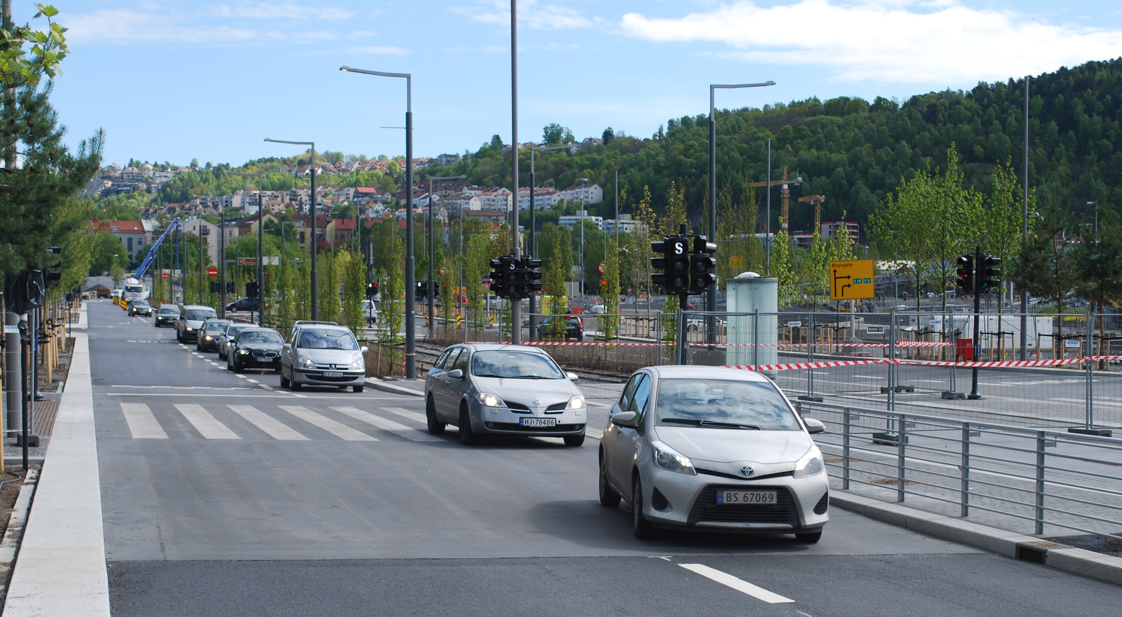 Dronning Eufemias gate, Bjørvika i Oslo, sett mot øst, mai 2014. Gamlebyen og Ekebergskråningen i bakgrunnen